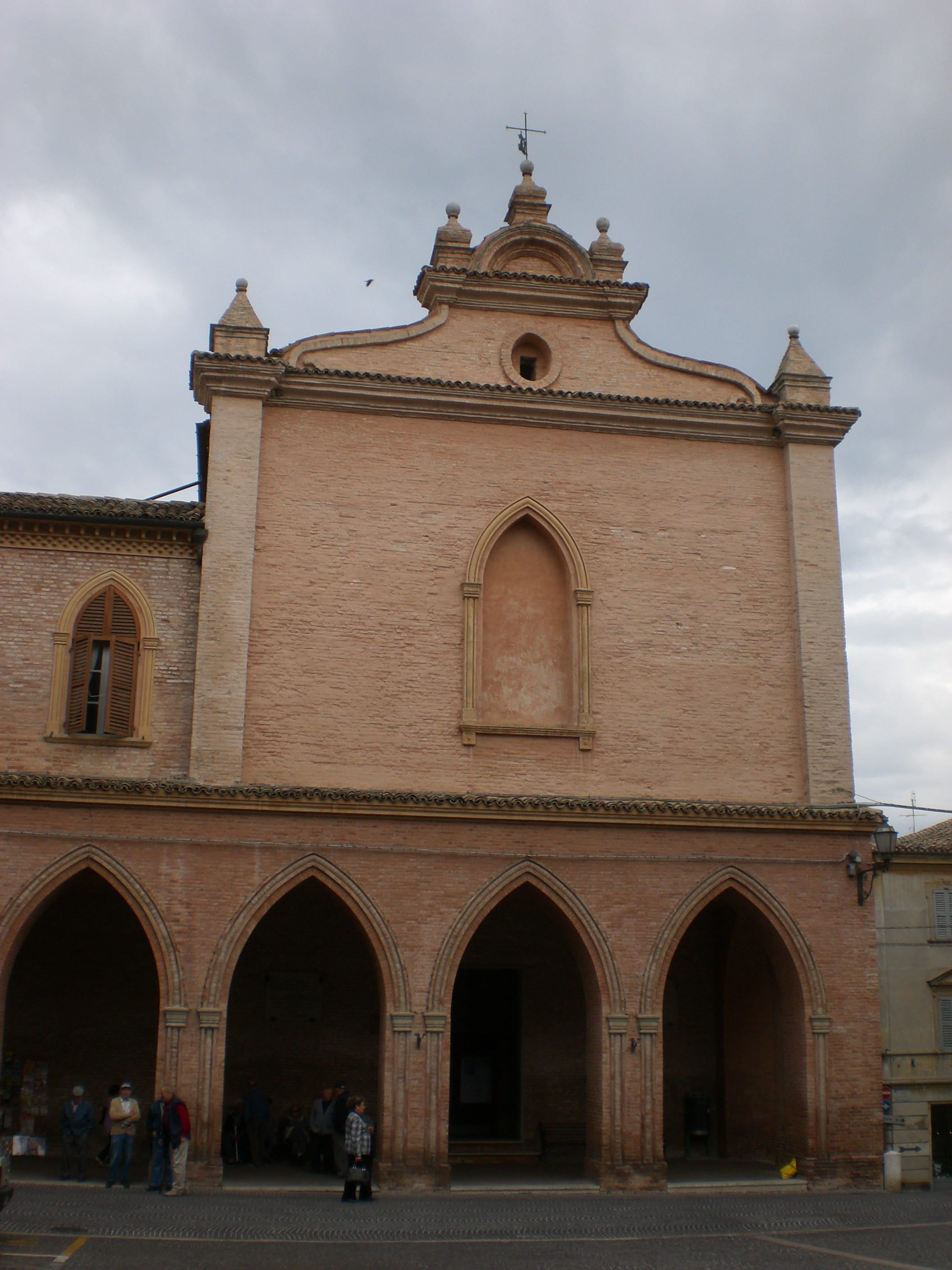 Ostra, Piazza Martiri, Collegiata di S.Francesco